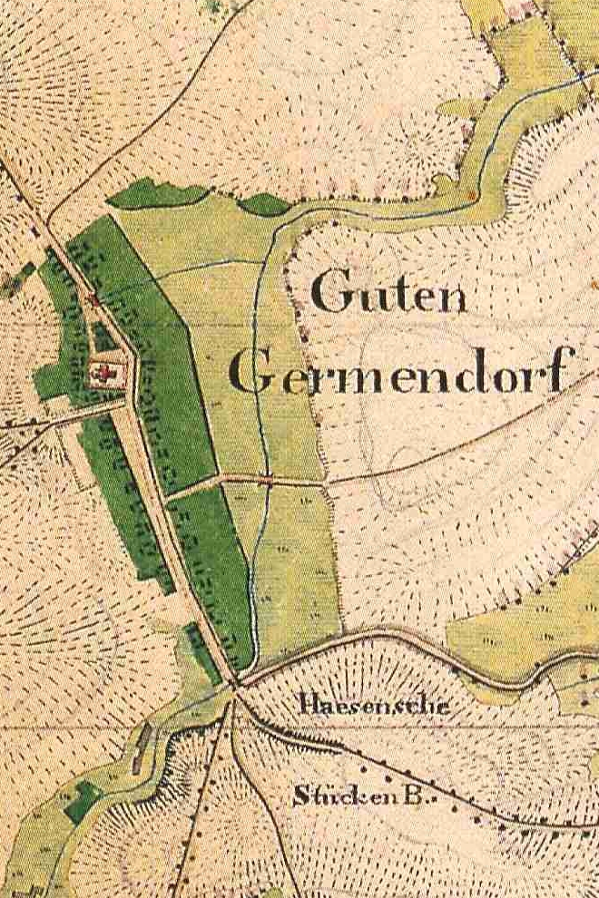 Karte von Gutengermendorf, Kreis Ruppin, Provinz Brandenburg, 1825